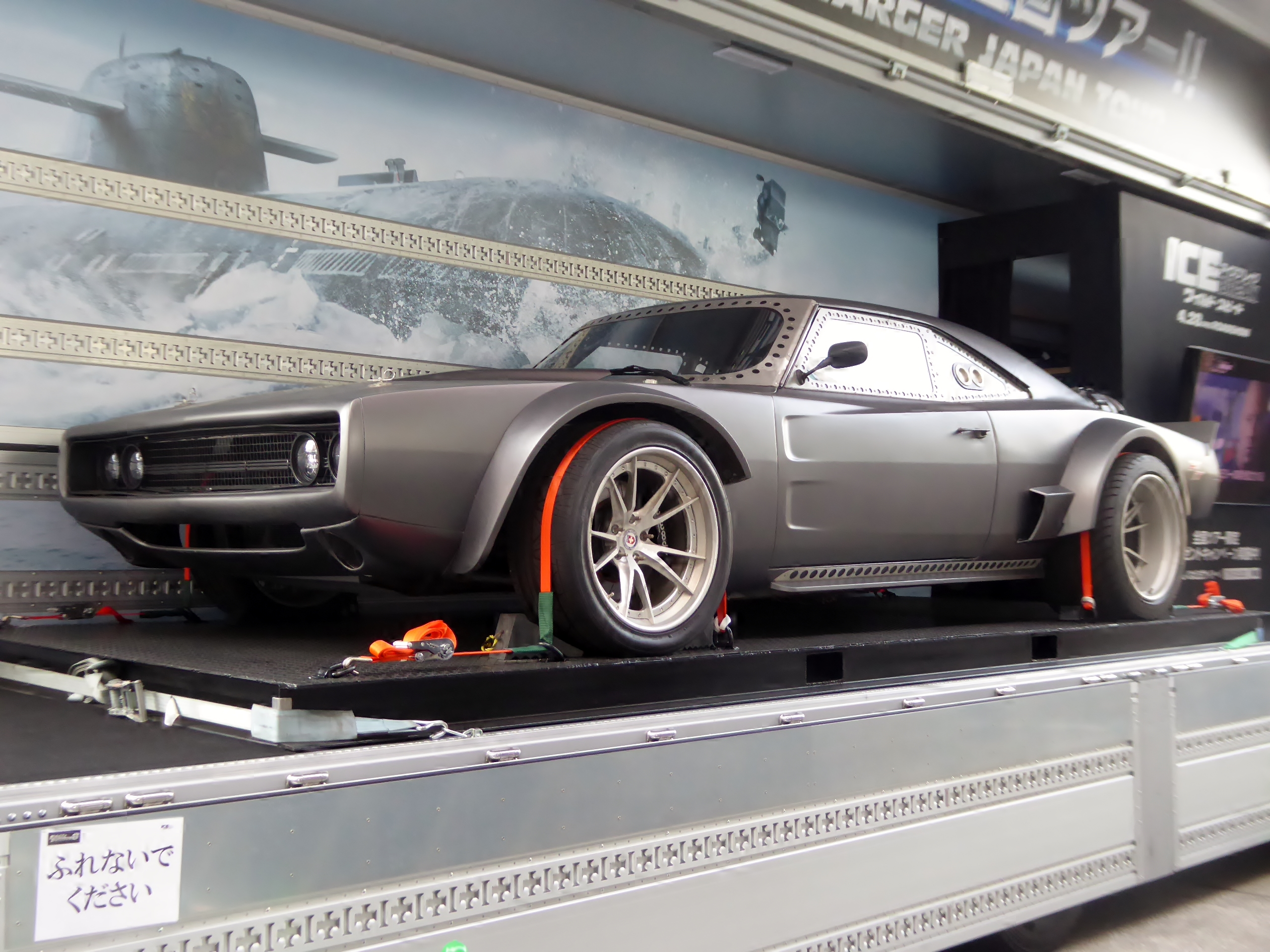 『ワイルド・スピード ICE BREAK』に登場するアイスチャージャーを撮影。